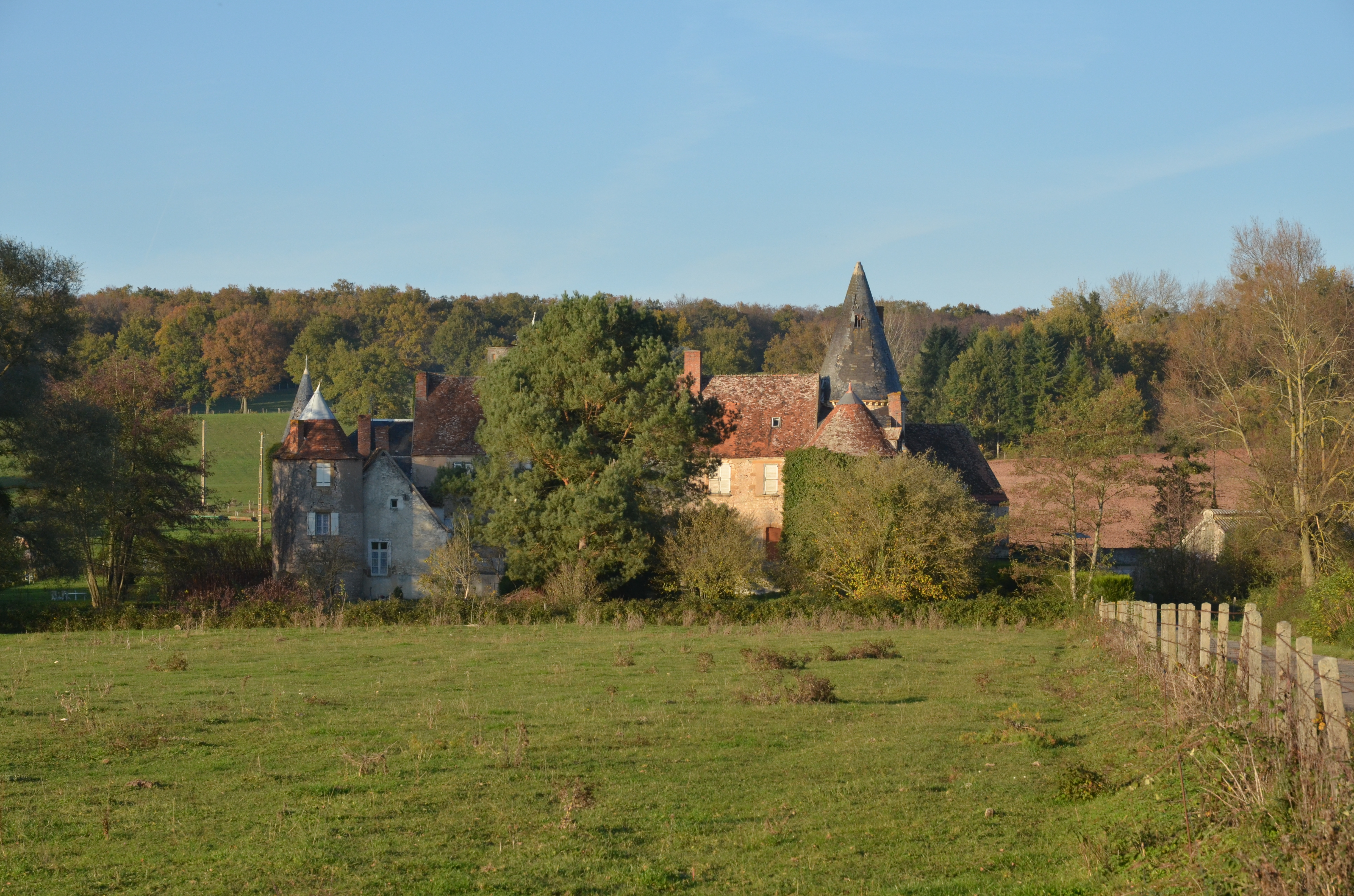 Vue d'ensemble du château en novembre 2011